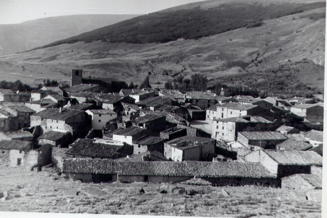 beraton en el 75 desde santa Barbara